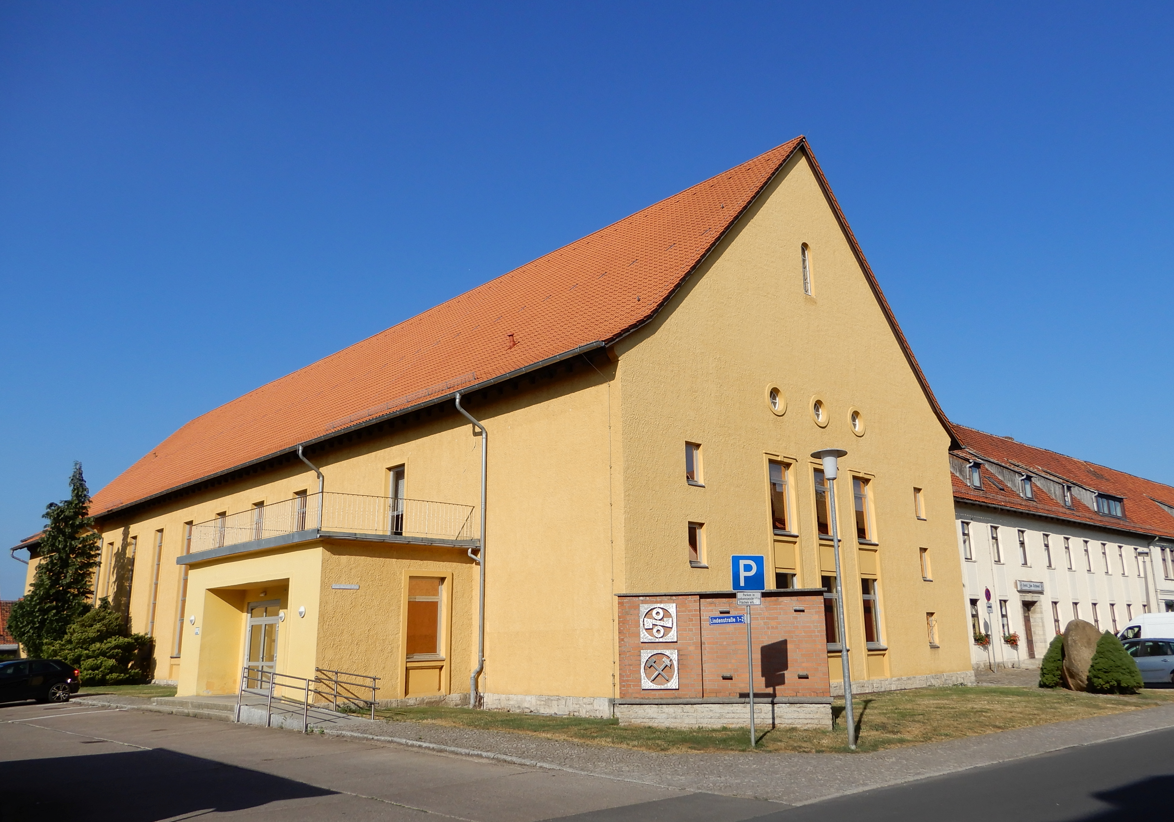 Komplex Lindenstraße 3 (Nachterstedt) mit Kulturhaus